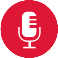 Logotipo Radio TeleElx